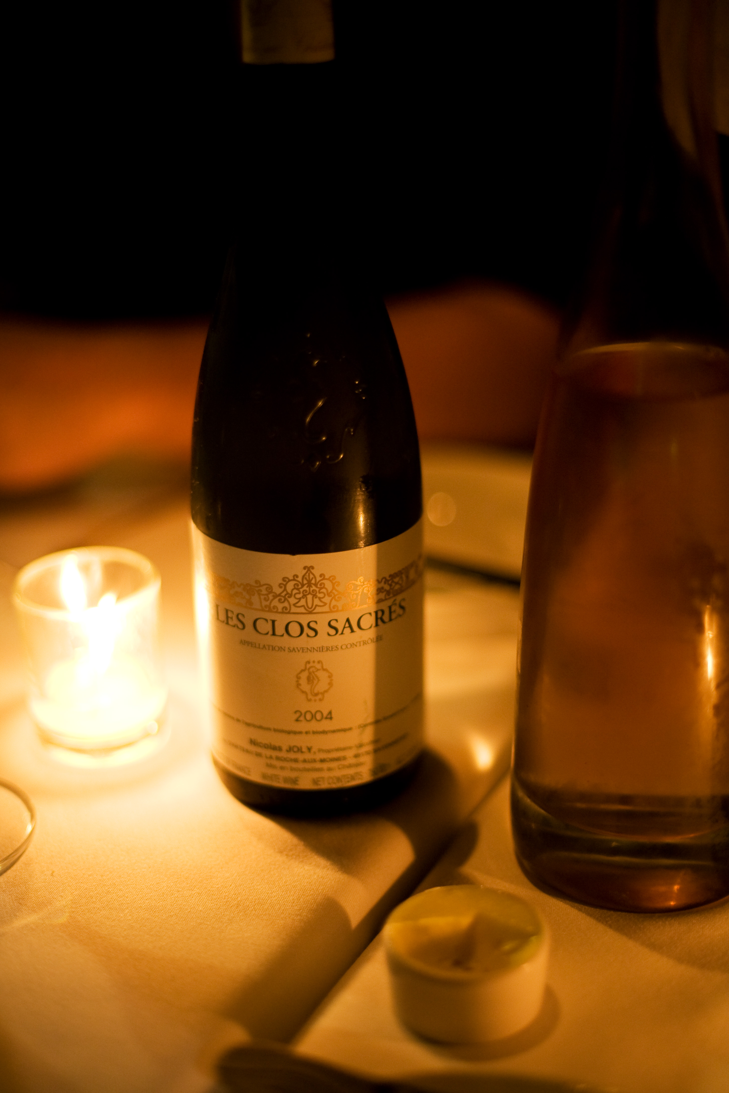 Les Clos Sacrés, 2004